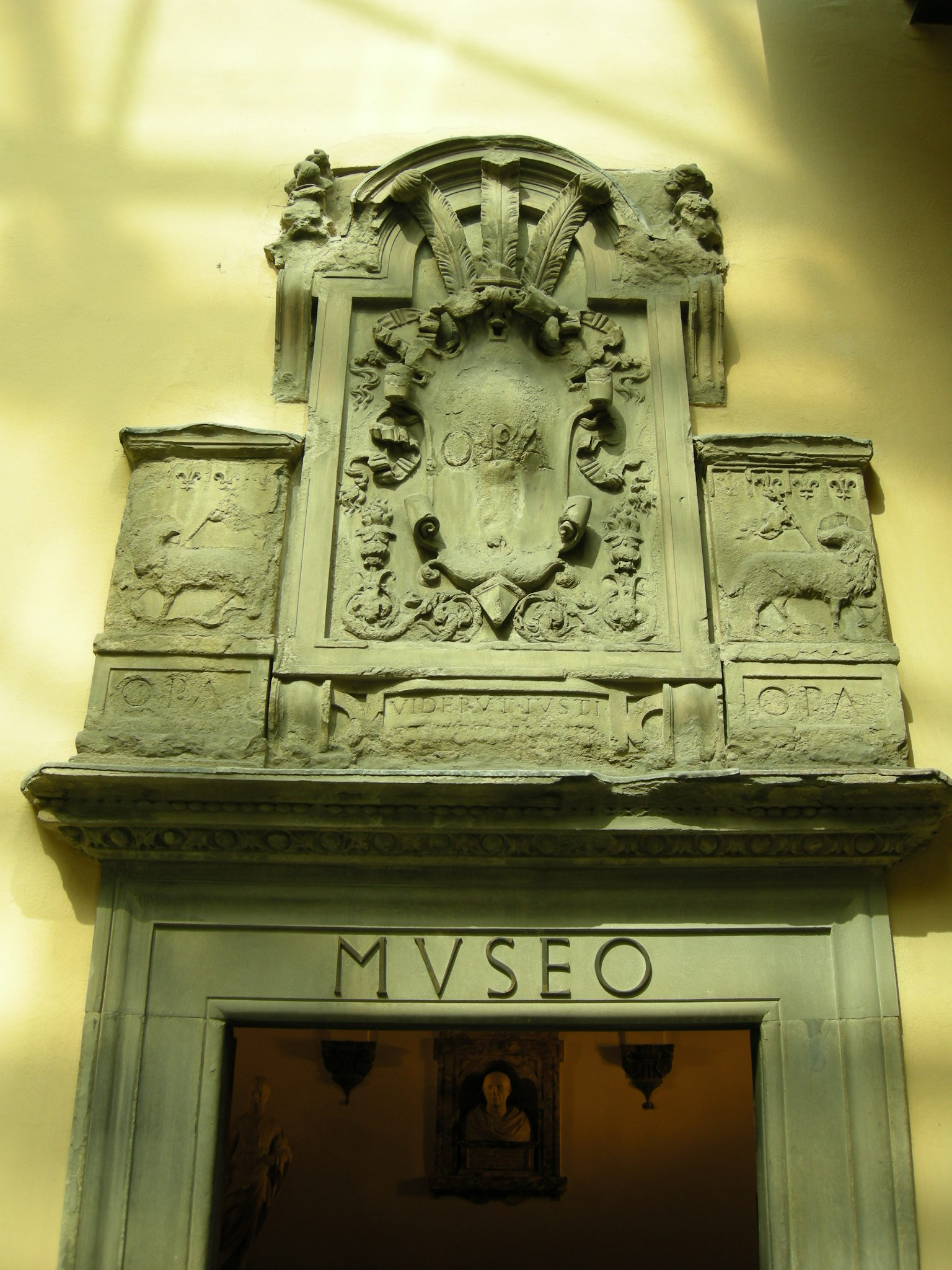 Opera del duomo, vecchia entrata